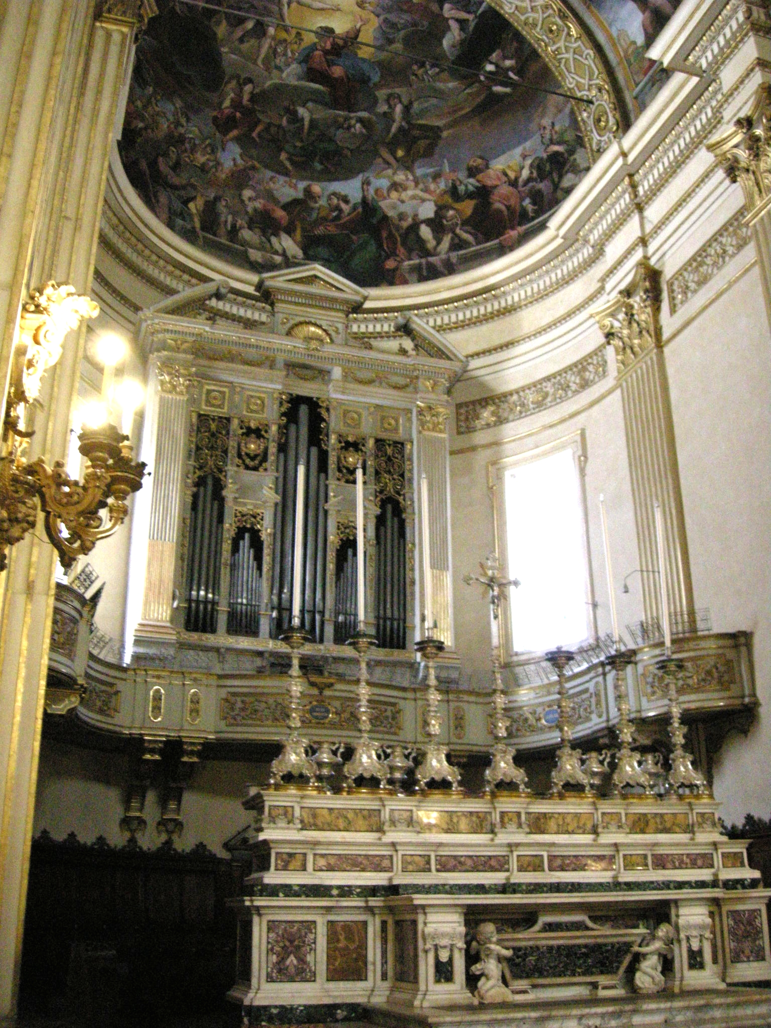 Madonna della Ghiara, interno